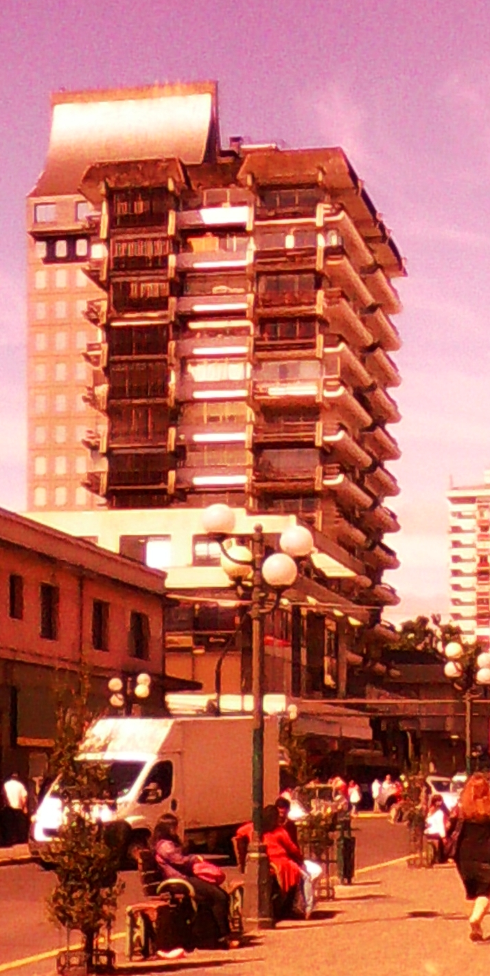 Edificio de la Secretaría Regional Ministerial de Bienes Nacionales, ubicado en avenida Arturo Prat 535, en el sector Centro de la ciudad de Temuco, Chile, donde antes funcionaba la Corte de Apelaciones. Foto tomada desde la avenida Arturo Prat, junto a la sede de la Universidad de Aconcagua.